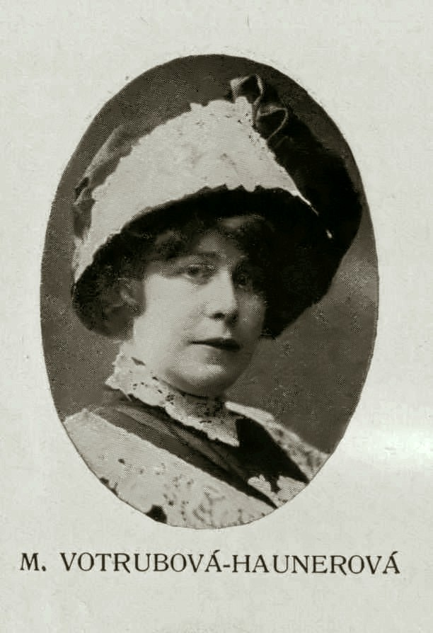 Marie Votrubová-Haunerová (1878 - 1957), Česká básnířka, dramatička a překladatelka.